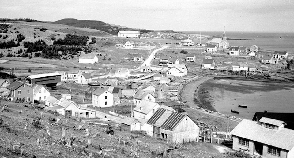 Village à Cloridorme, Gaspé sud